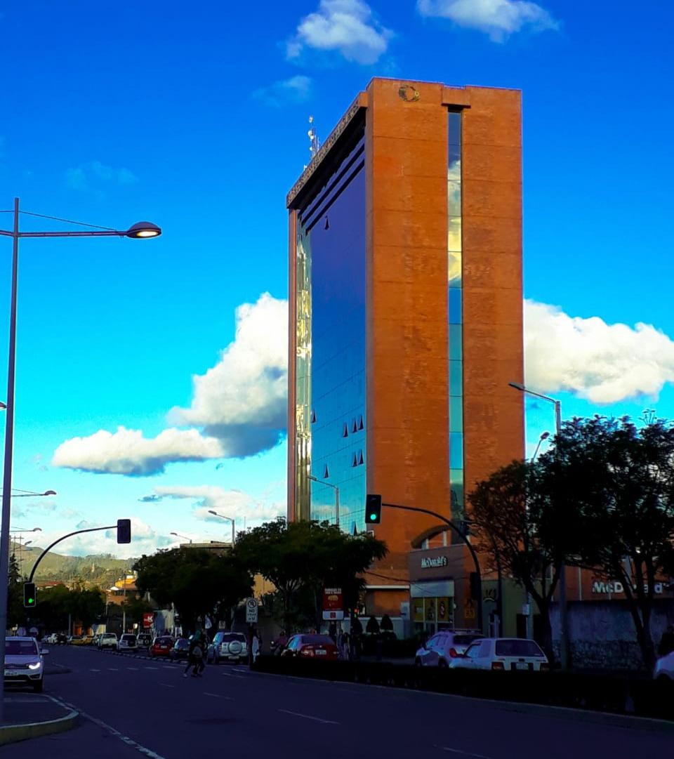 Edificio de la Cámara de Comercio e Industrias de Cuenca.